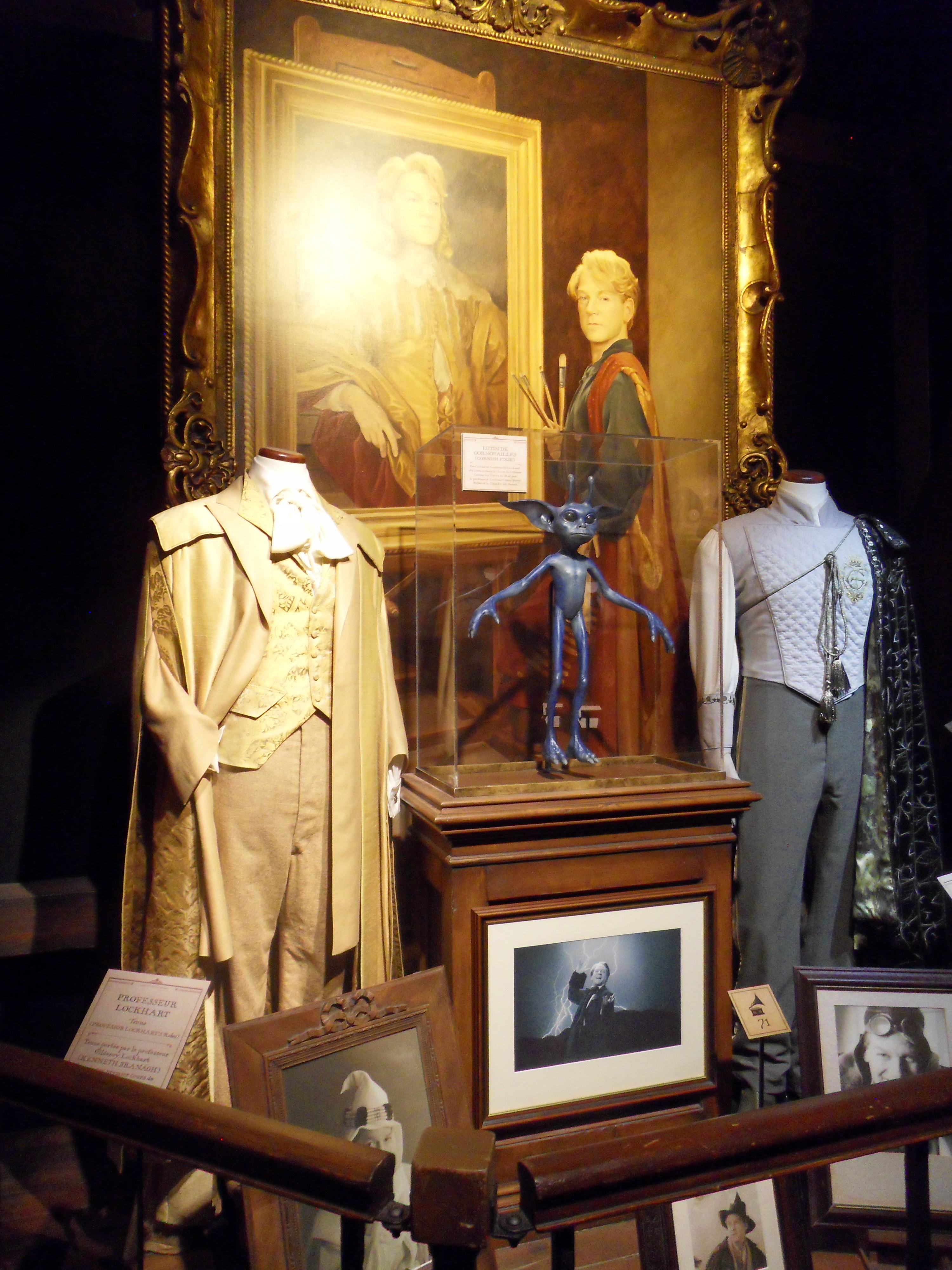 Tenues de Lockhart, Harry Potter Exhibition, Cité du Cinéma, Saint Denis (Paris) avril 2015